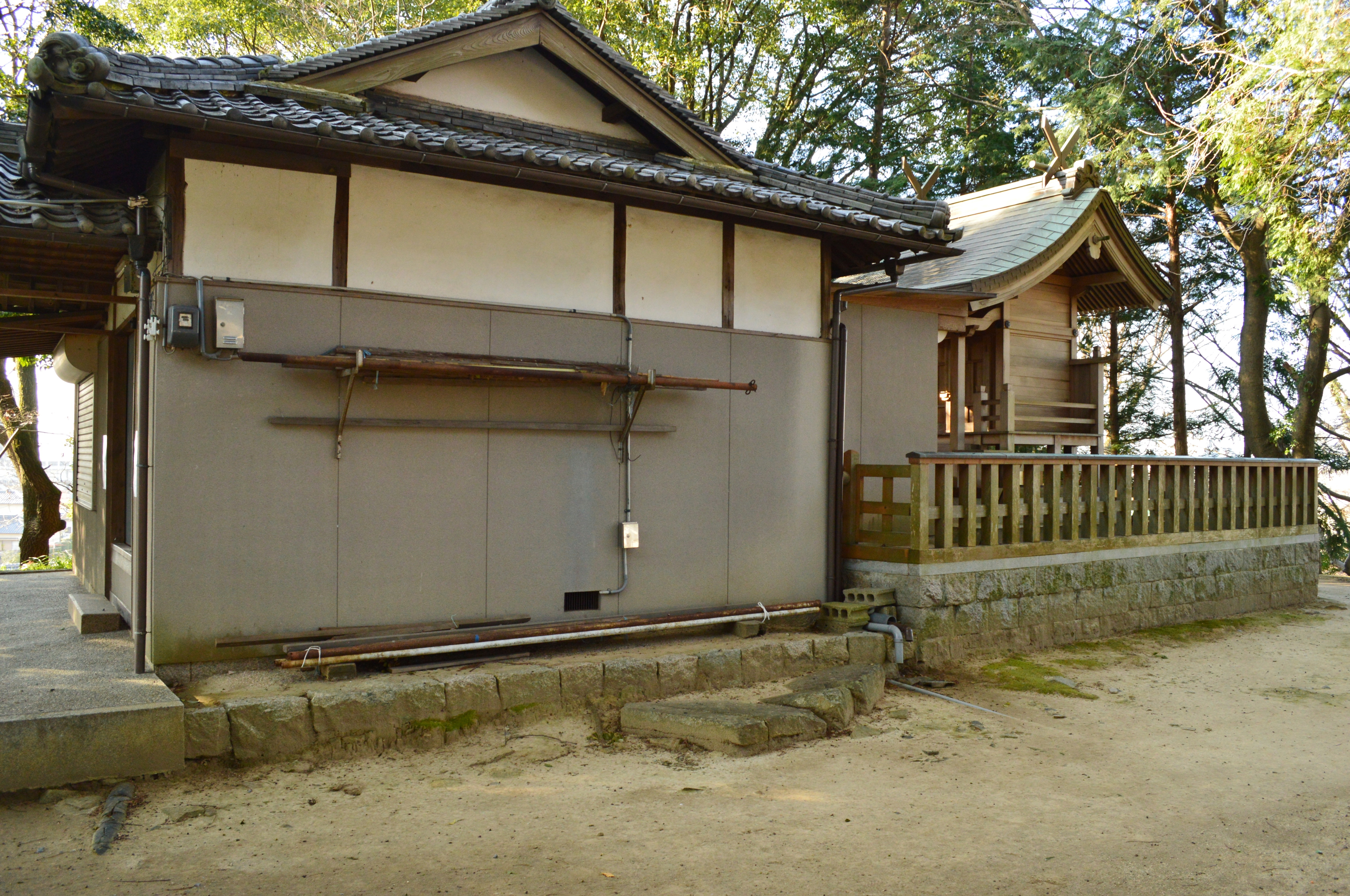 天計神社 社殿 Nikon D3200